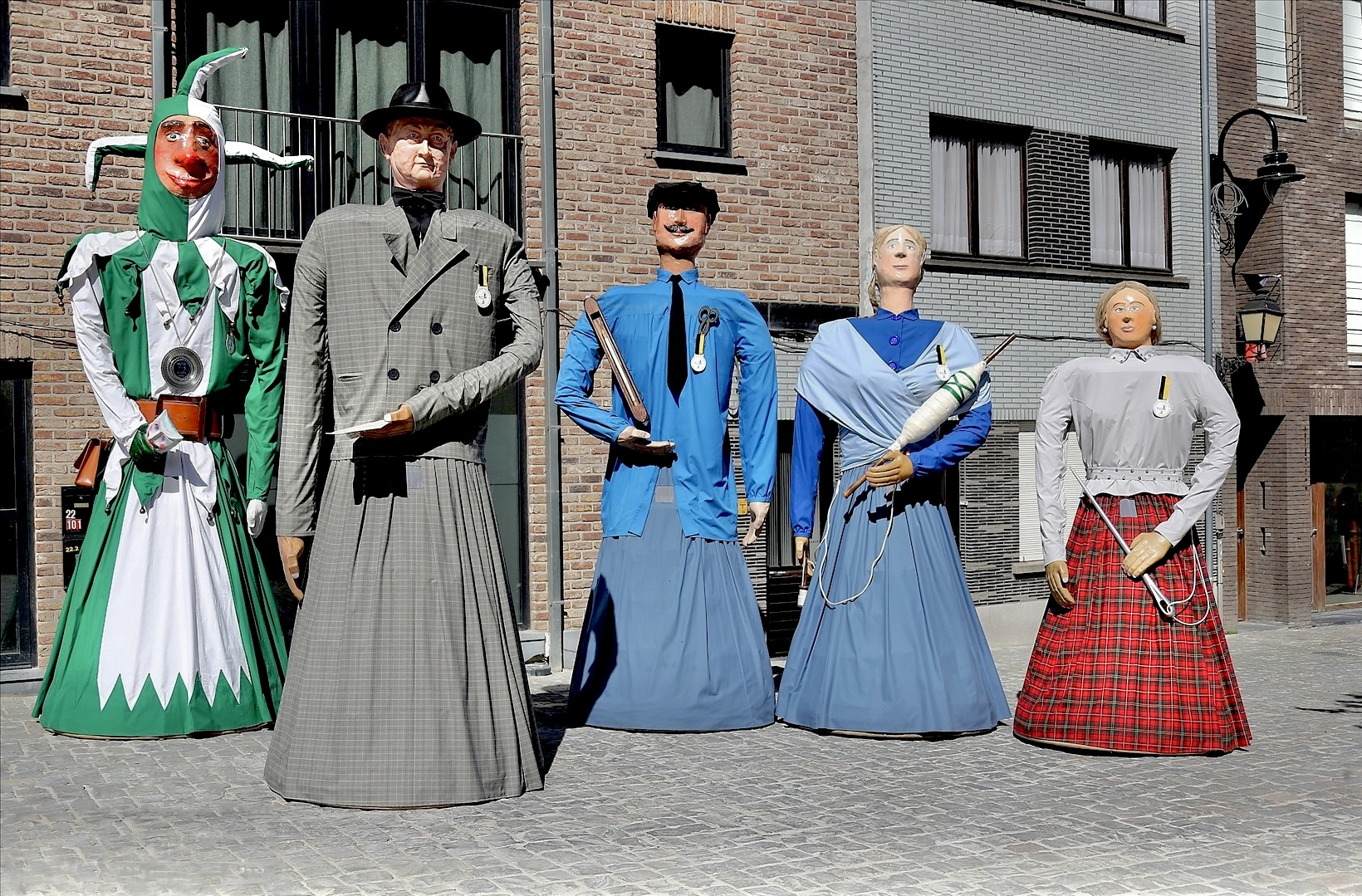 De reuzen van Ronse - M.A.X. de Zot van Ronse, Ephrem de Beiaardier, Staf de Wever, Manse de spinster, Angeleki de Naaister - bij de heropening van het Sint-Maartensplein te Ronse